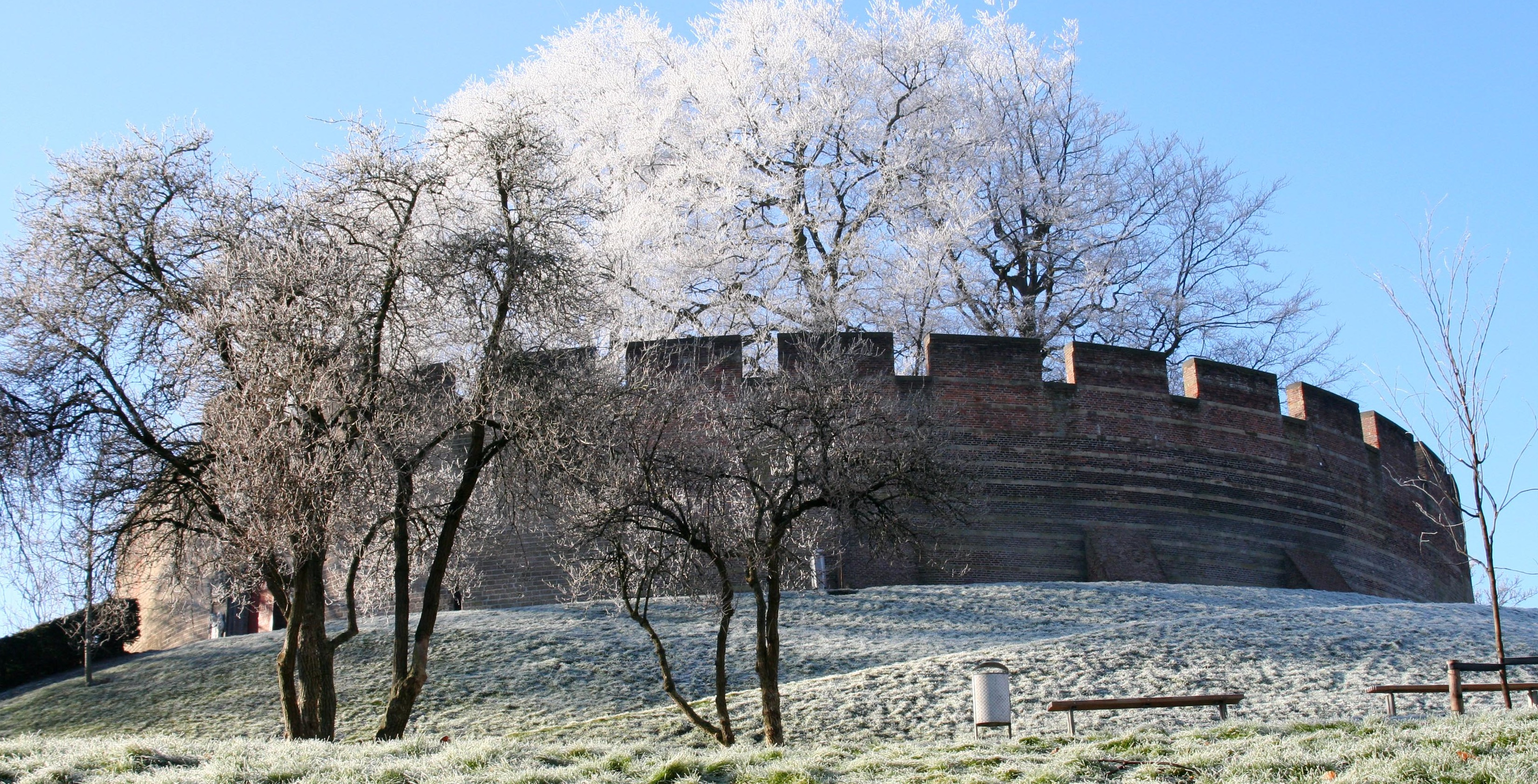 De burcht van Leiden is een van de oudste nog bestaande voorbeelden van een burcht in Nederland. Het bouwwerk bevindt zich midden in Leiden, op de plek waar de twee armen van de Rijn samenvloeien. Het ronde bouwwerk bevindt zich op een motte, een kunstmatige heuvel, en kan worden betreden door een zandstenen poort.